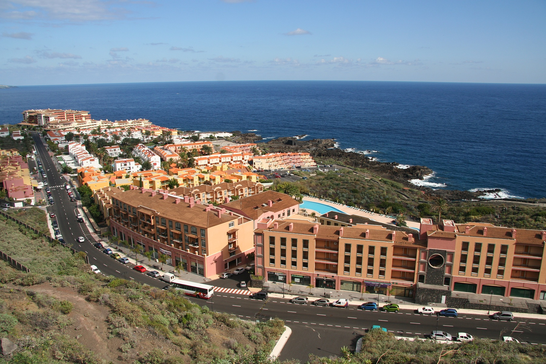 Los Cancajos, Blick von der LP-5 Richtung Nordosten